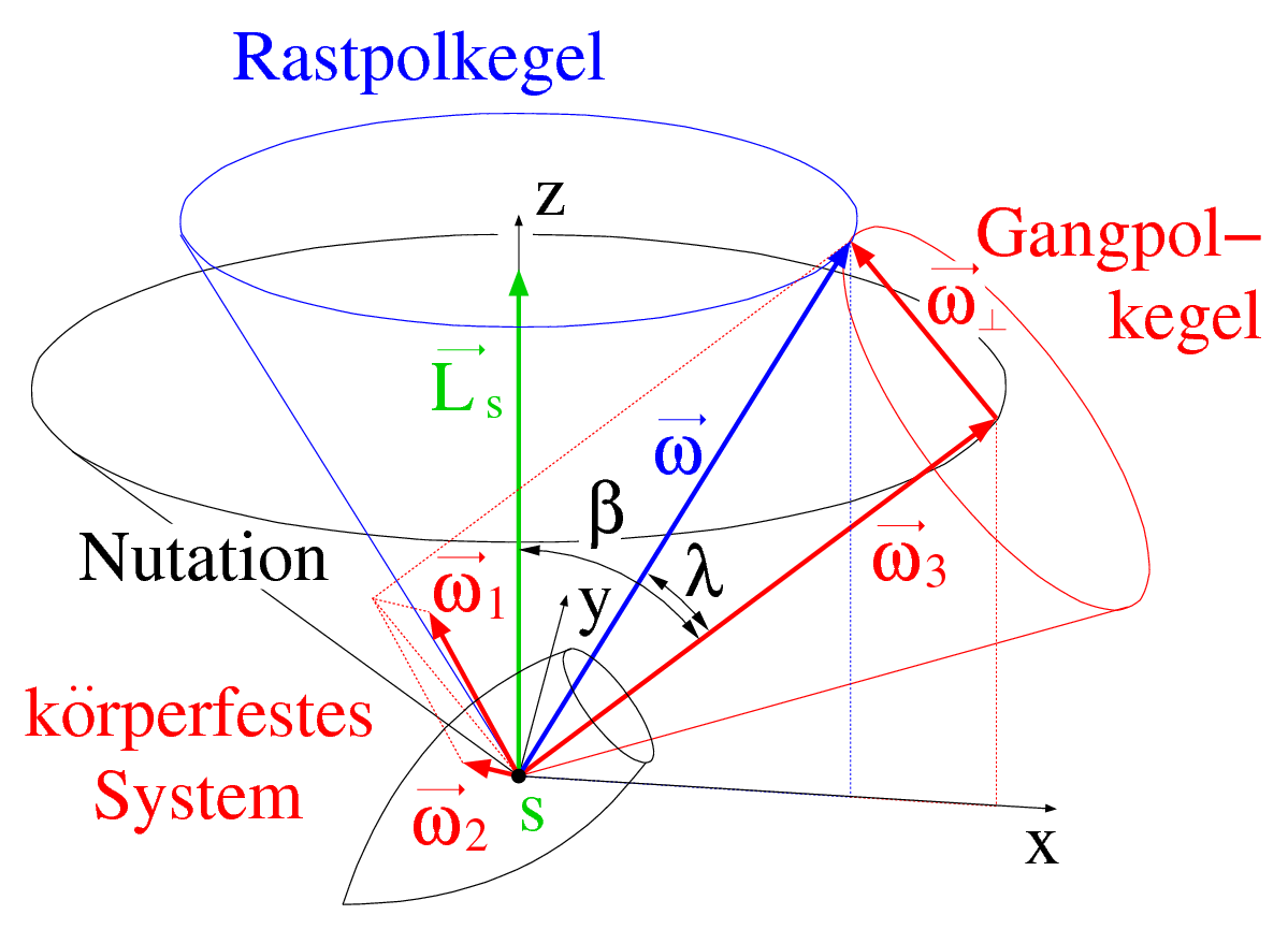 Bewegungskomponenten beim kräftefreien Kreiskegel